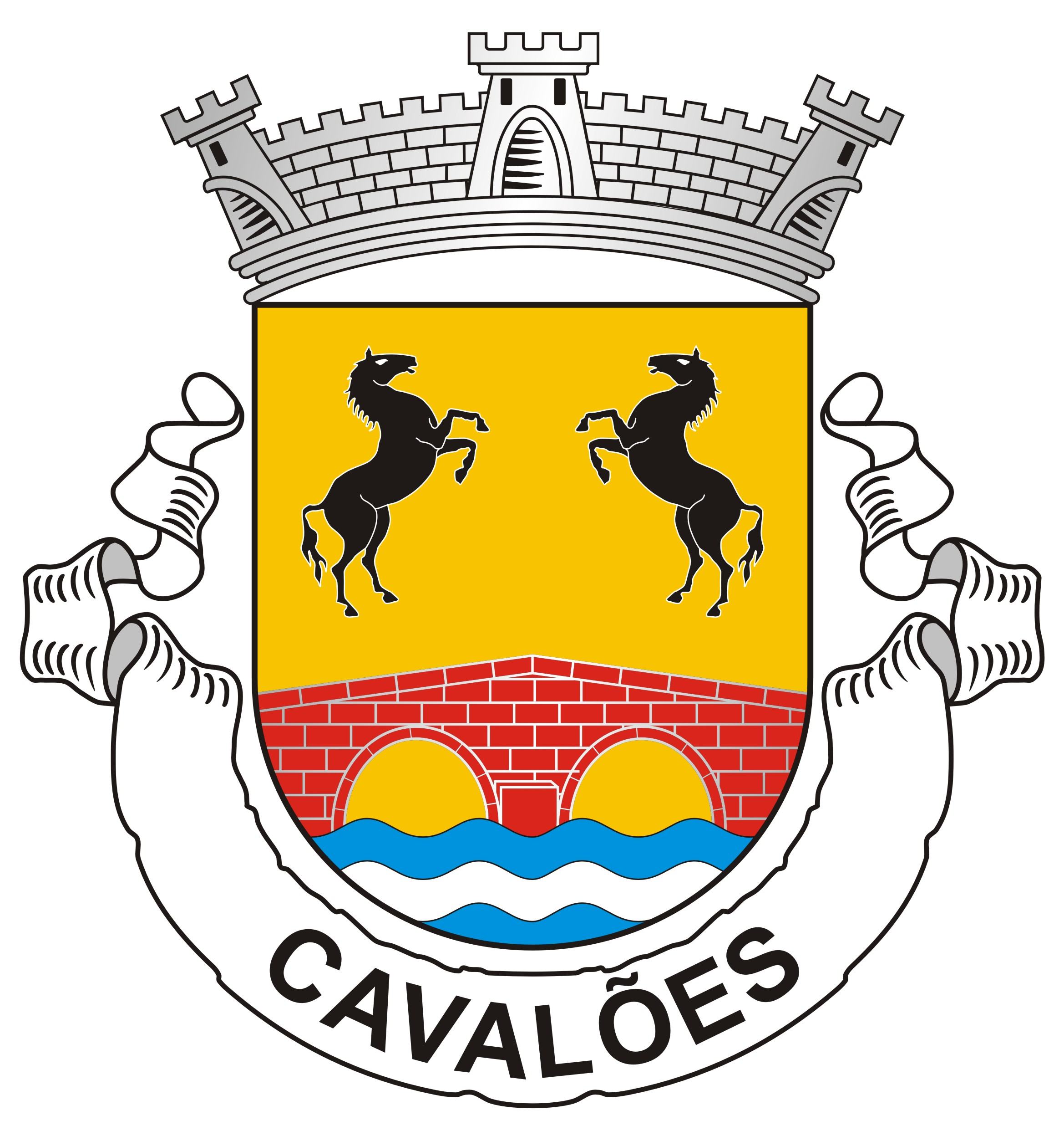 Brasão da Freguesia de Cavalões